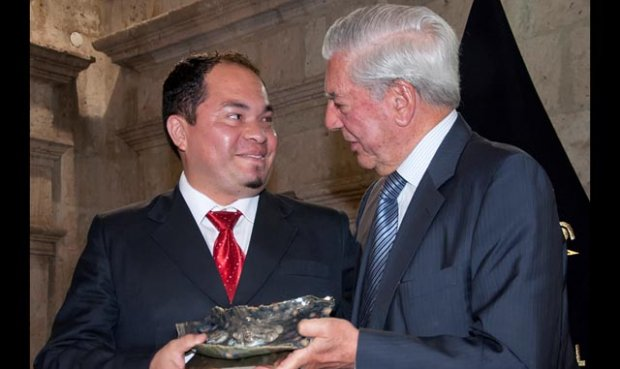 Premiación de PEDRO NOVOA